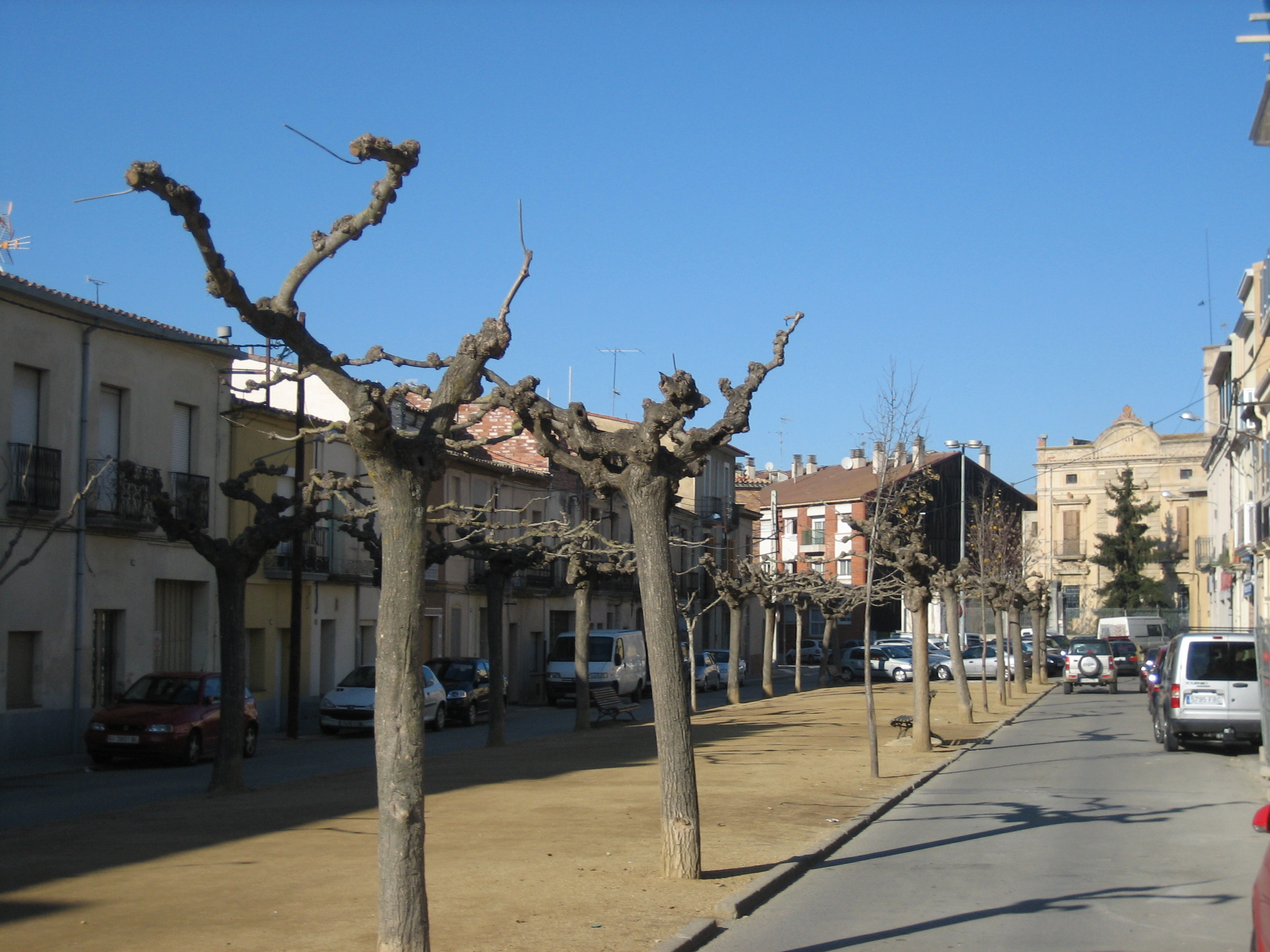 Passeig de Pompeu Fabra de Llagostera